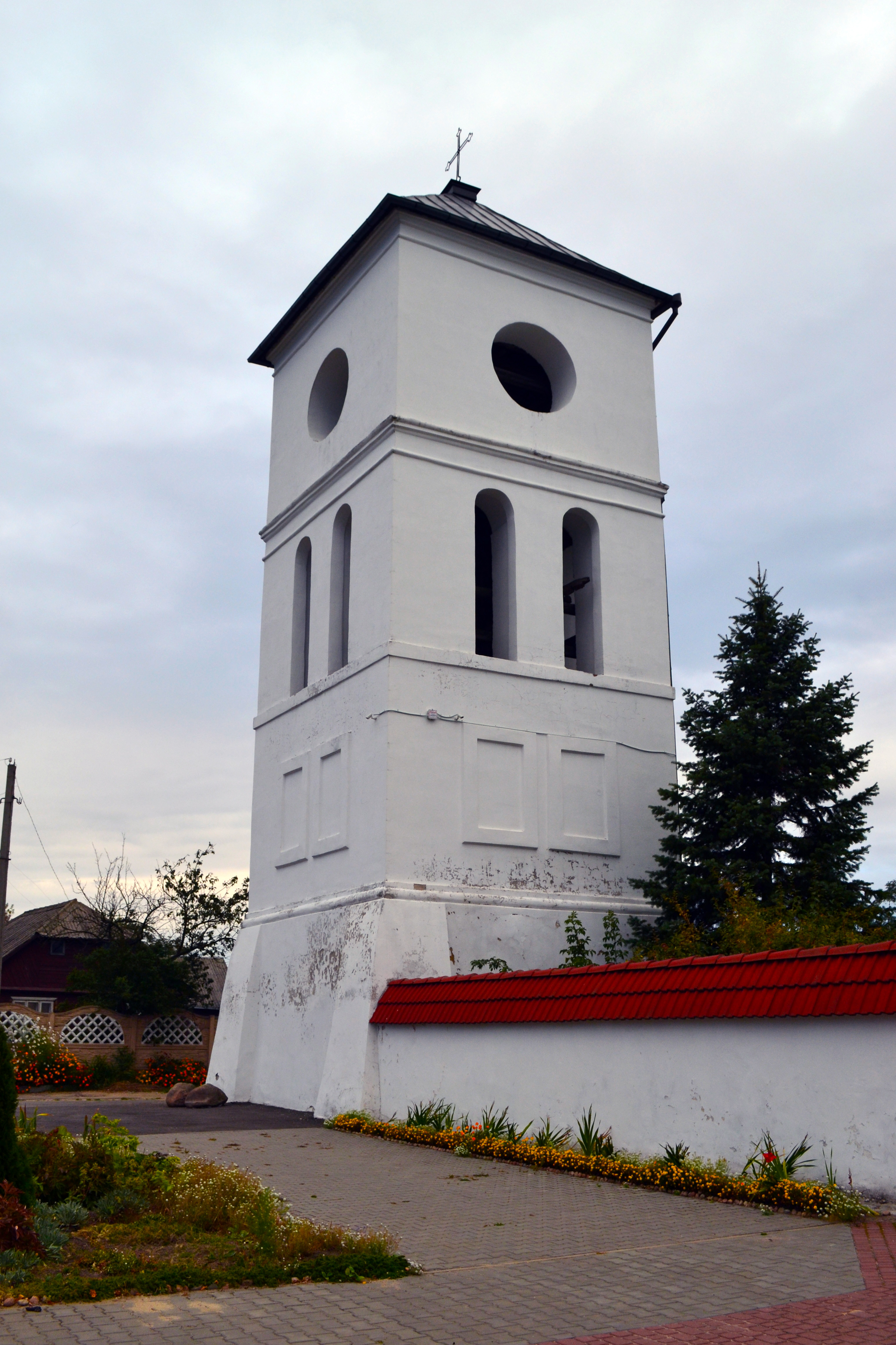 Беларуская (тарашкевіца): Траецкі касьцёл са званіцай, в. Чарнаўчыцы This is a photo of Belarusian heritage monument. Reference number: 112Г000122 ( WLM)